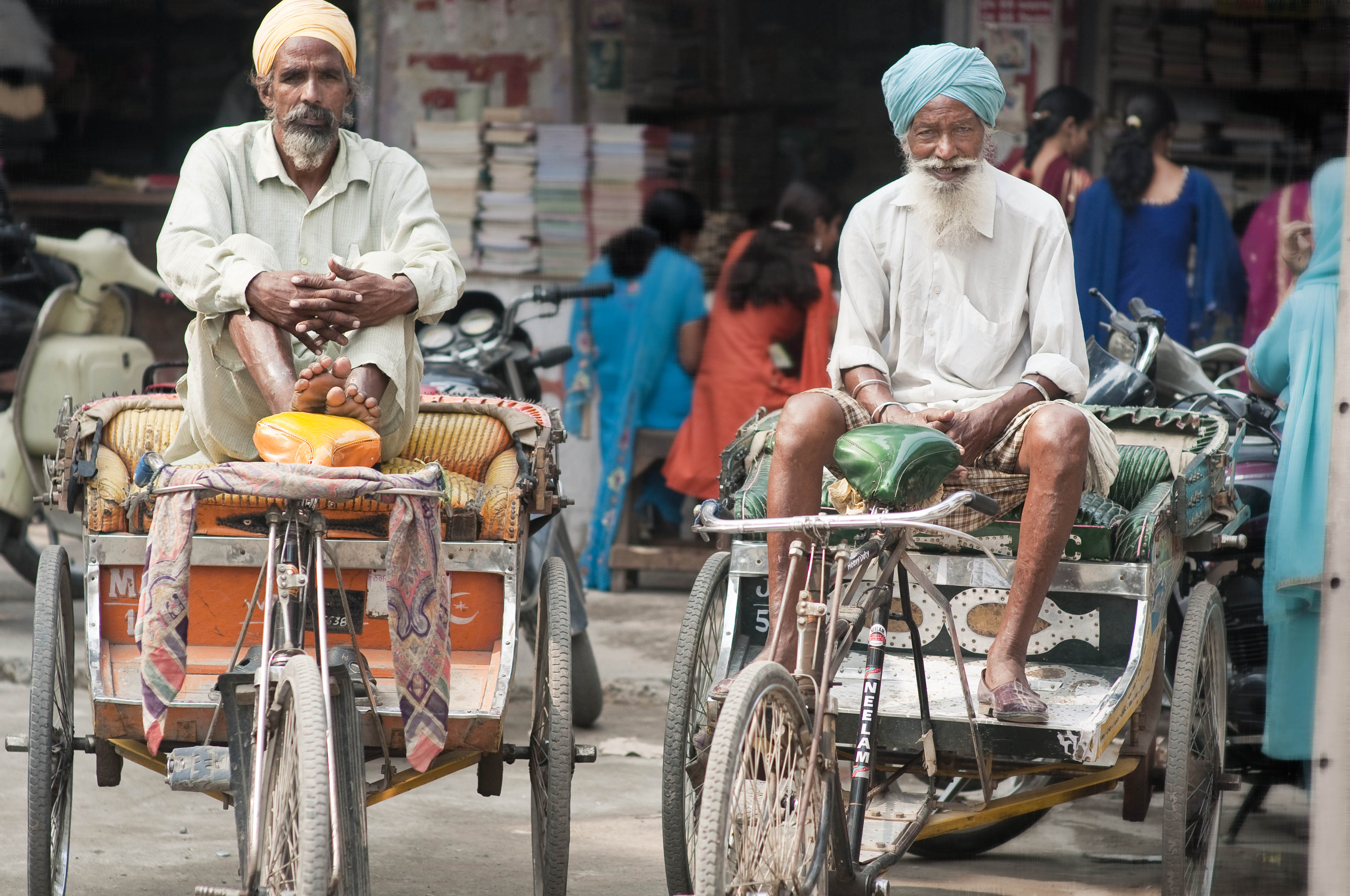 Amritsar